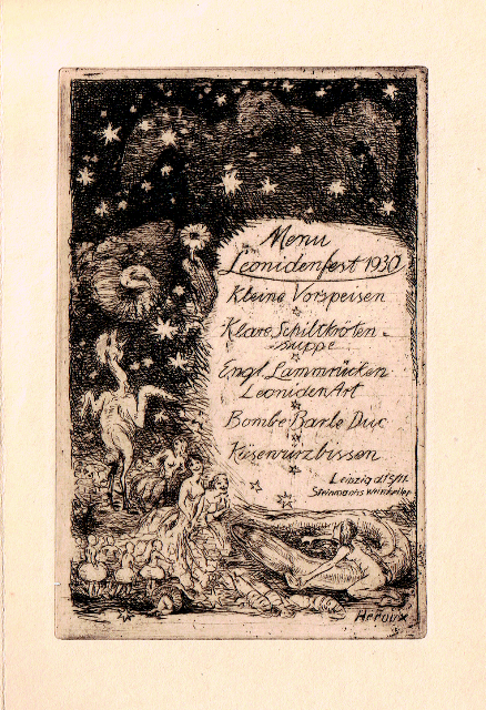 Radieung von Bruno Héroux